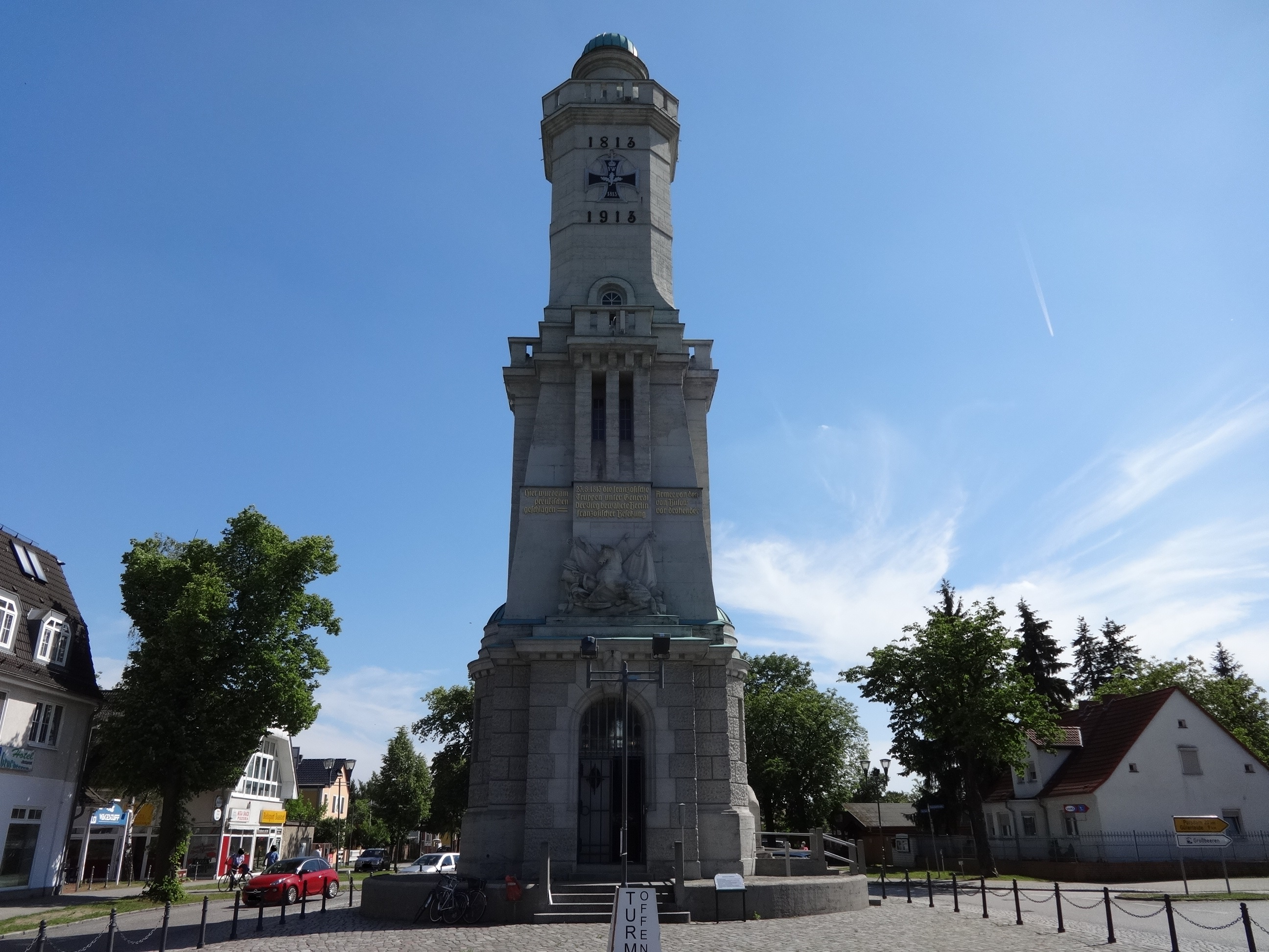 Gedenkturm an die Schlacht von Großbeeren aus 1913 in der gleichnamigen Gemeinde im Landkreis Teltow-Fläming